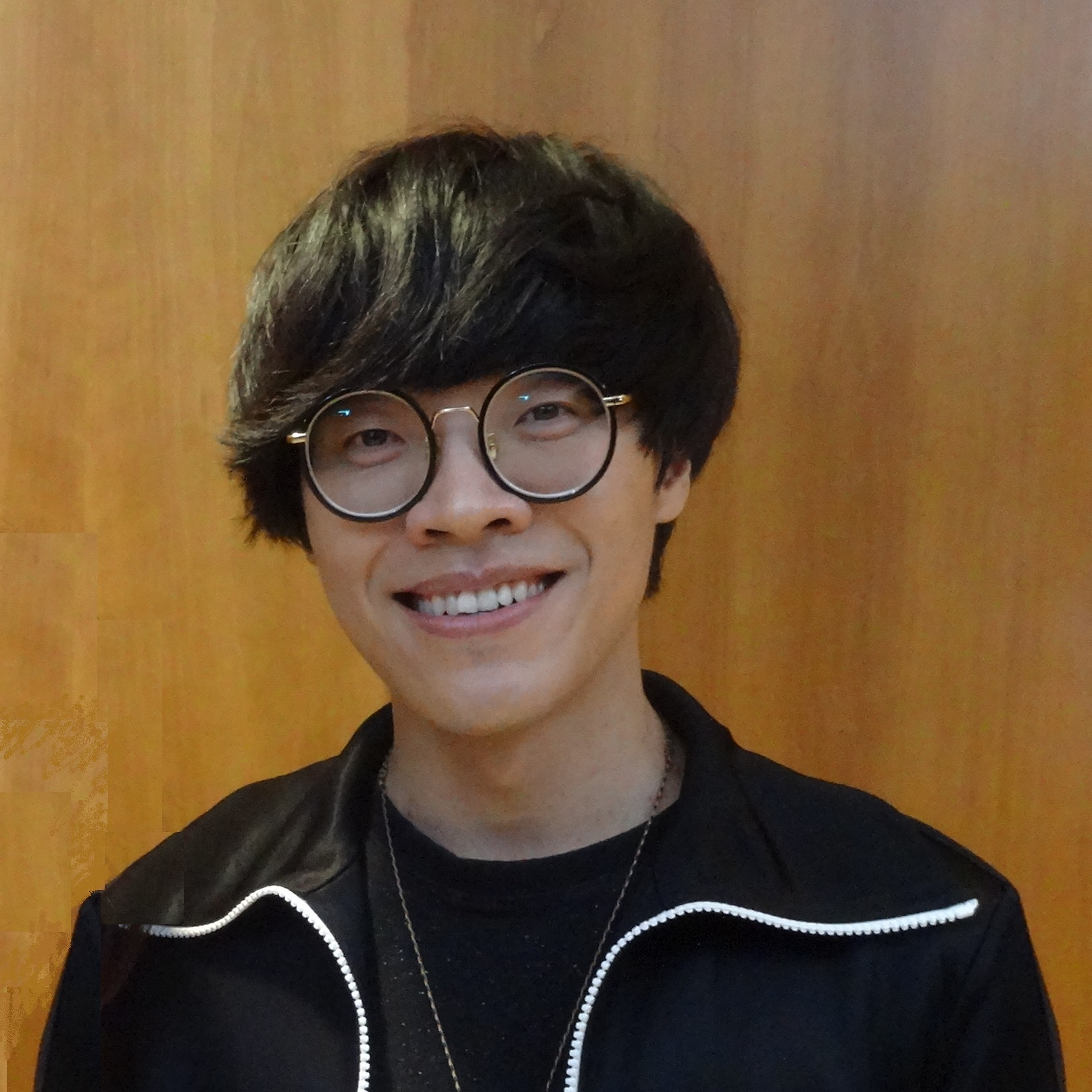 クラウド・ルー盧廣仲(20180223)